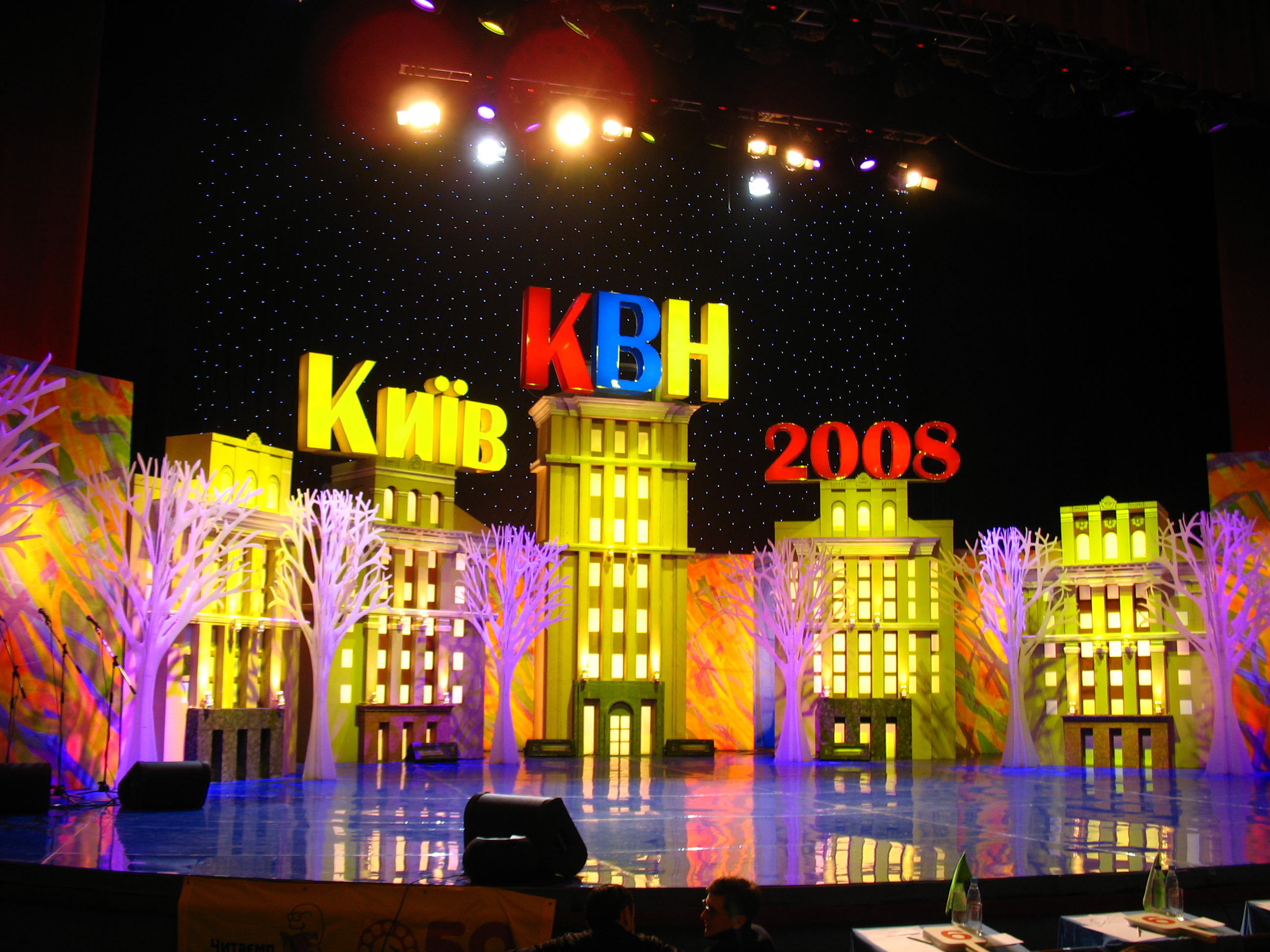 Сцена Международного центра культуры и искусств Федерации профсоюзов Украины (более известен как Октябрьский дворец), Киев. Здесь проводились игры Высшей Украинской Лиги КВН.